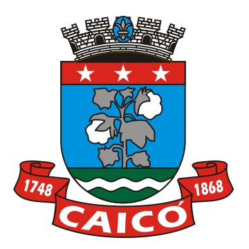 Brasão de Caicó/RN.